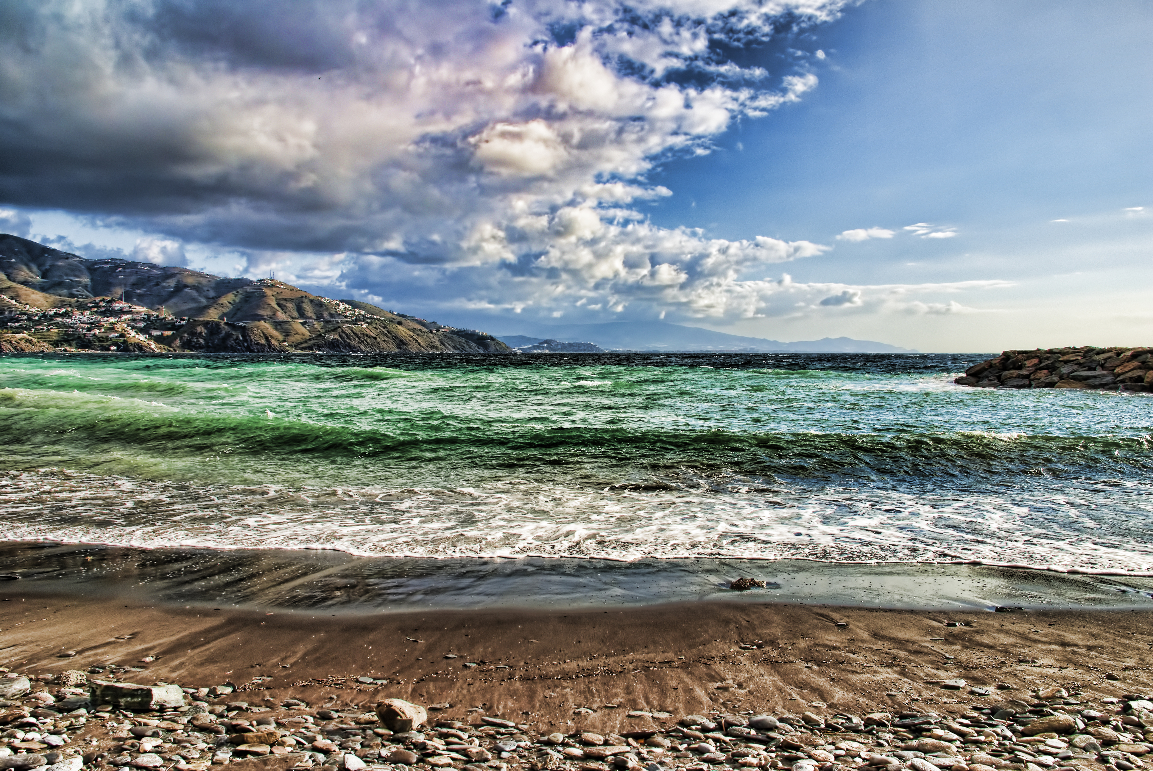 Almuñécar, Granada R.E.M. Everybody Hurts